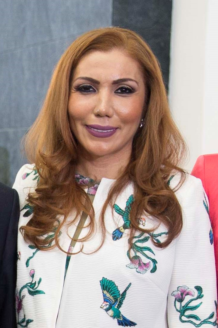 Itzel Rios de la Mora, senadora de México de 2012 a 2018.